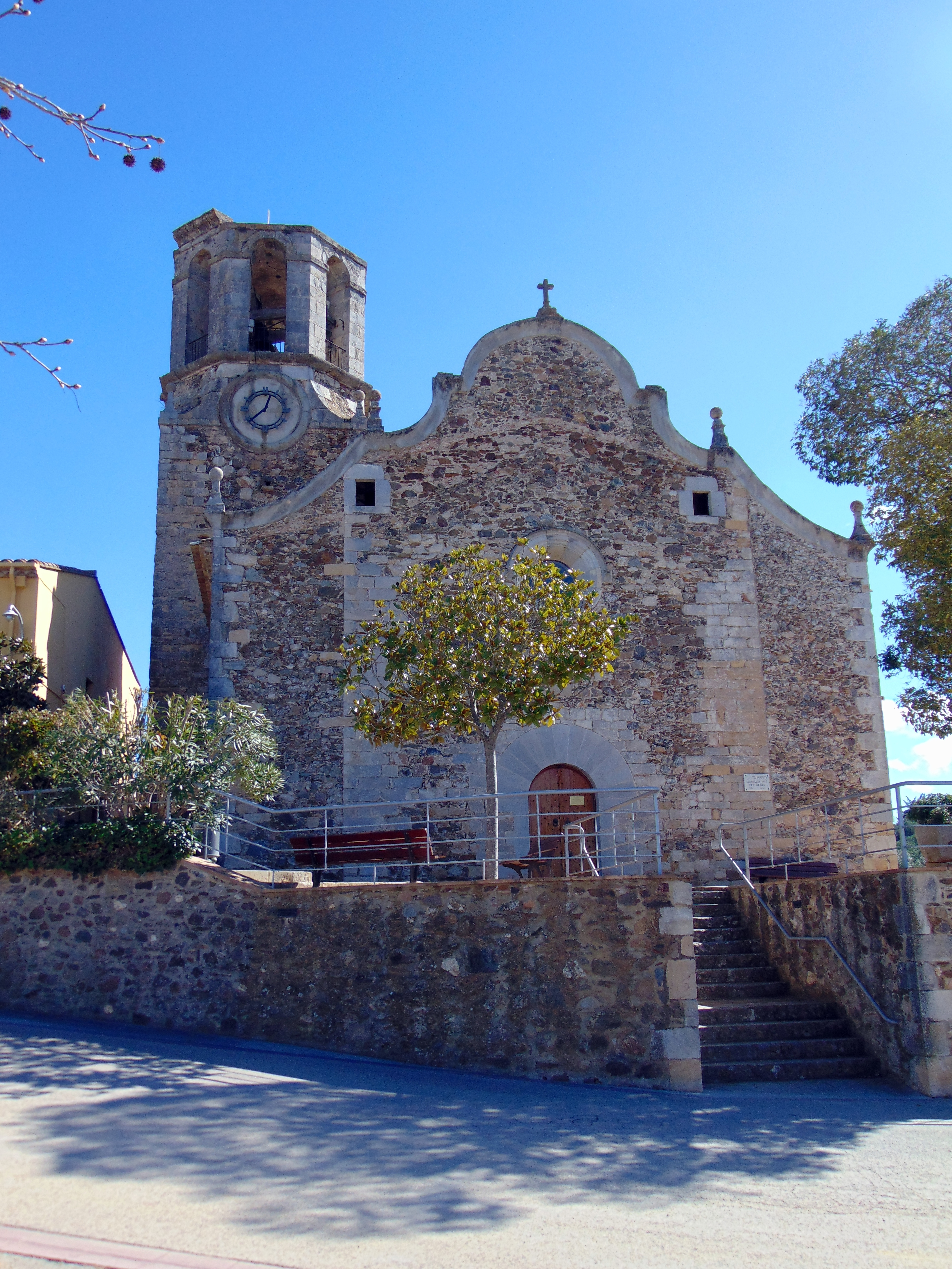 Església parroquial de Sant Cristòfol (Llambilles)